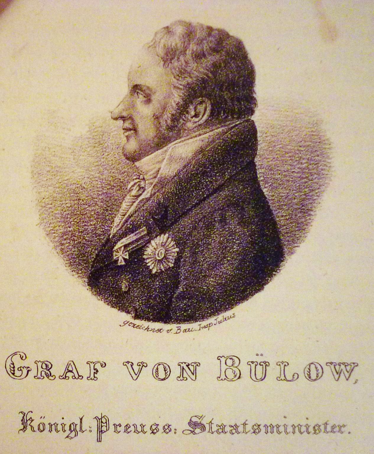 Ludwig Friedrich Viktor Hans Graf